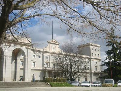 Fachada del edificio central de la UNAV